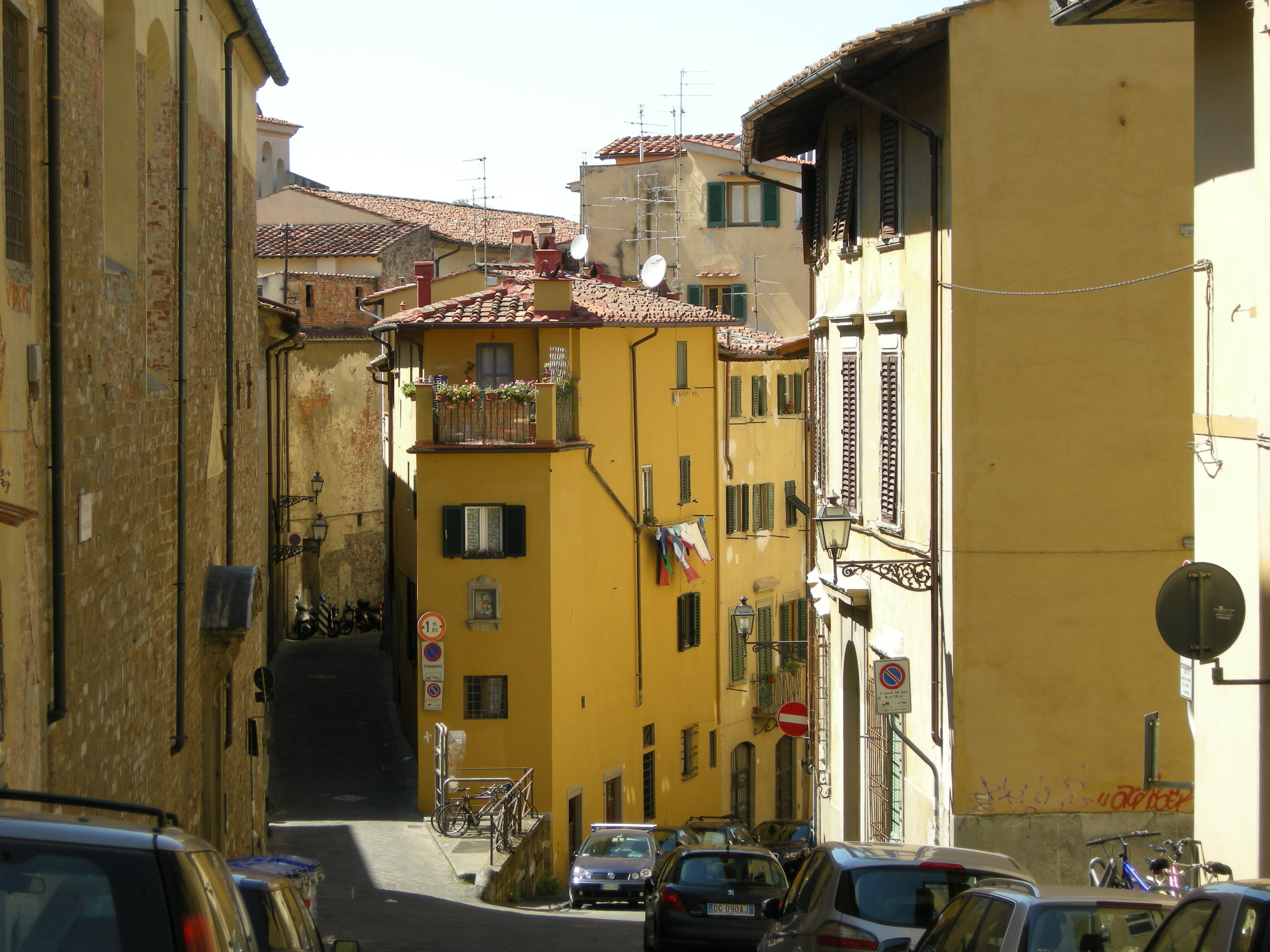 Costa san giorgio